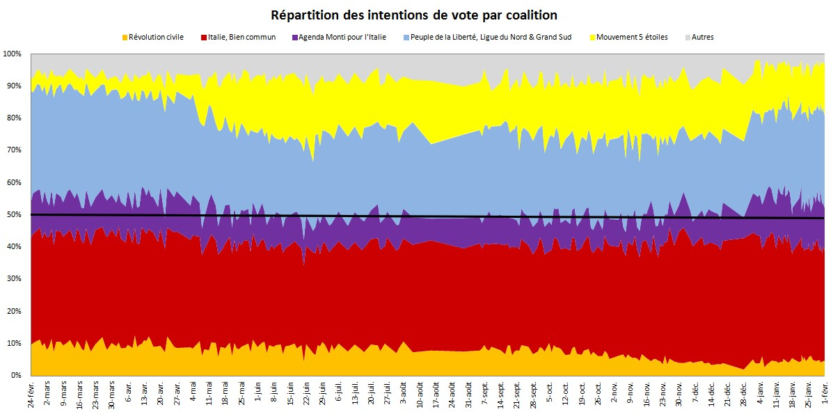 Evolution des intentions de vote par coalition entre le 24 février 2012 et le 10 janvier 2013.